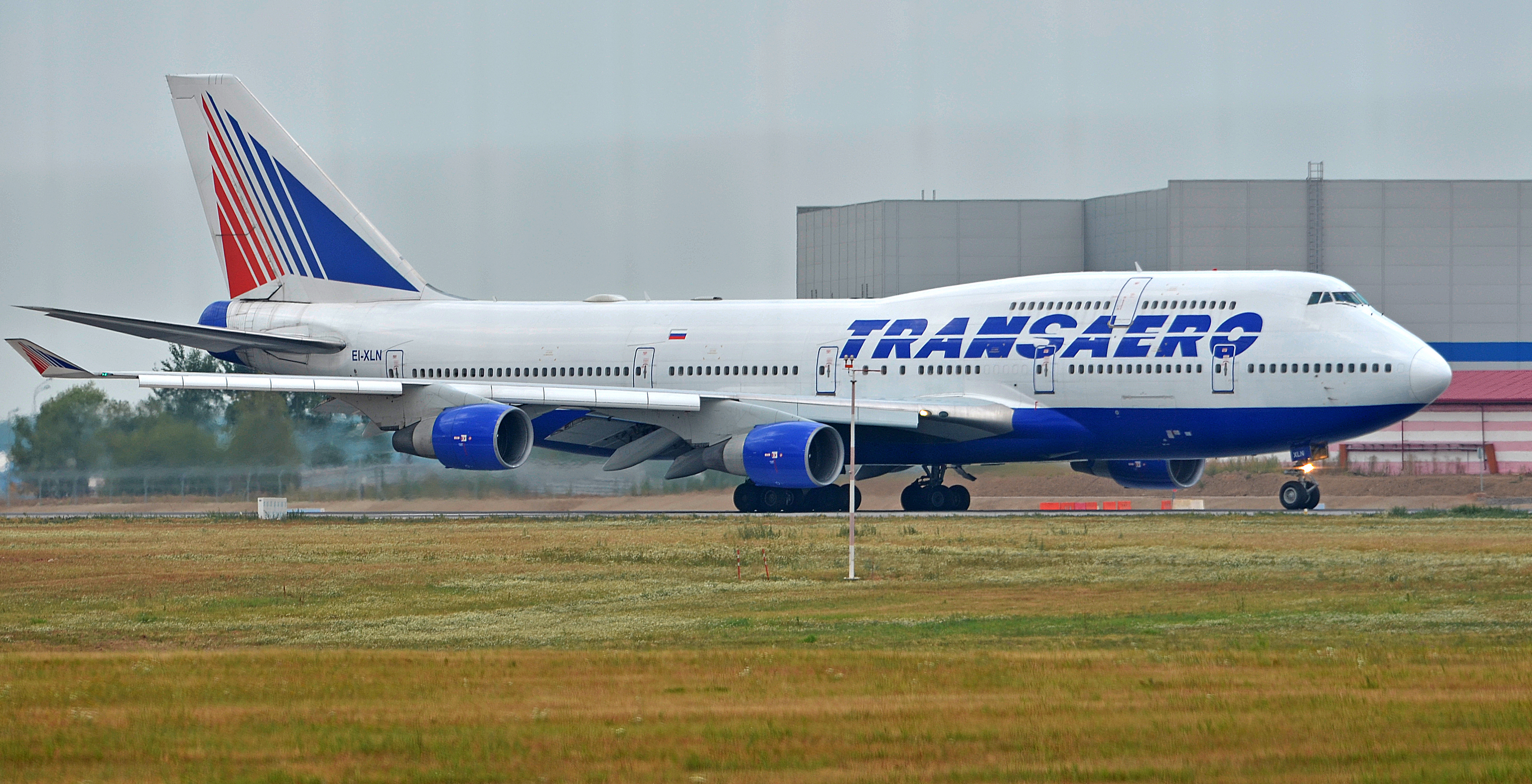 Можно увидеть здесь : You can see here